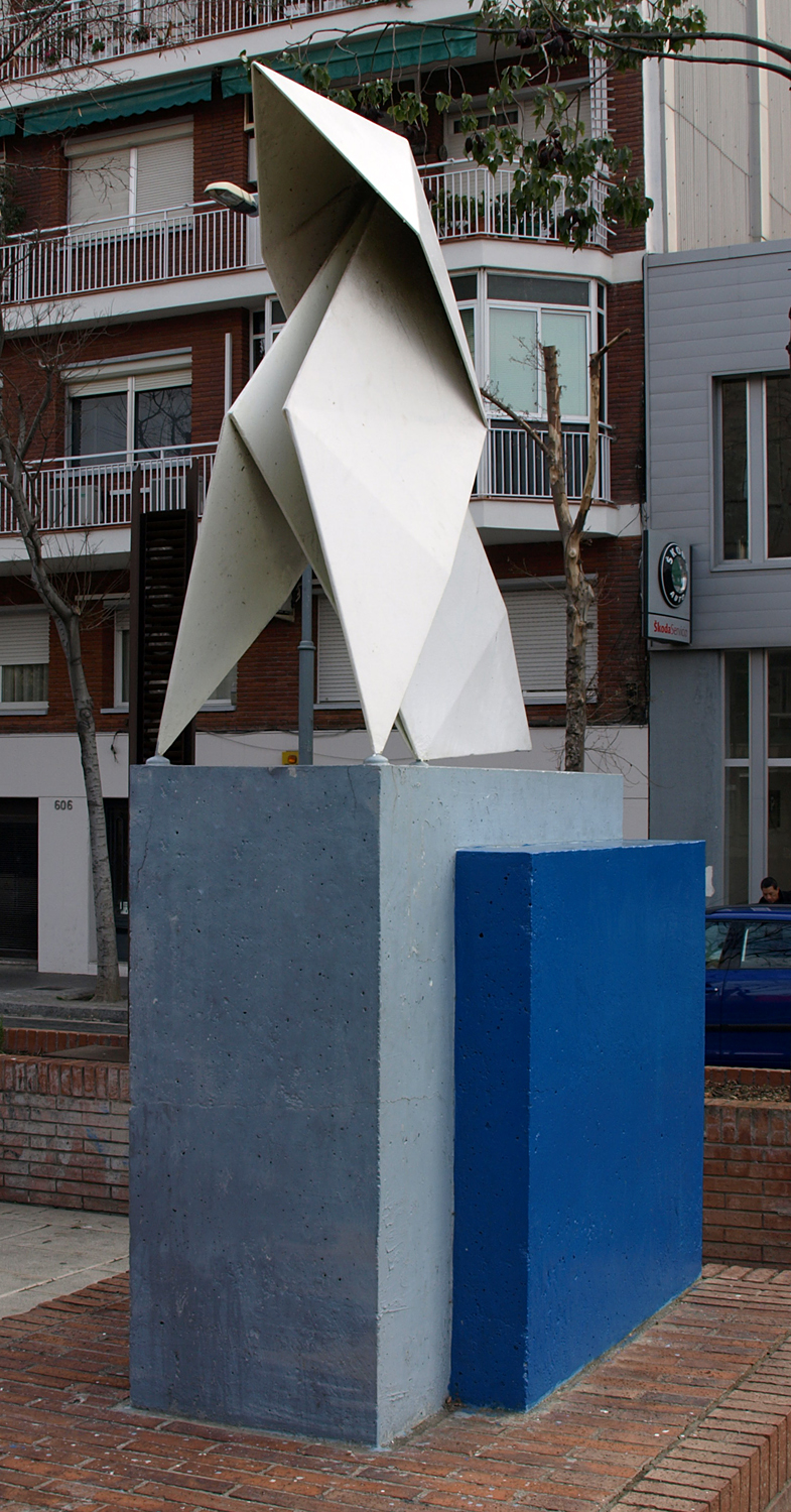 Las Pajaritas (Ramón Acín, 1923 / Julio Luján, 1991)